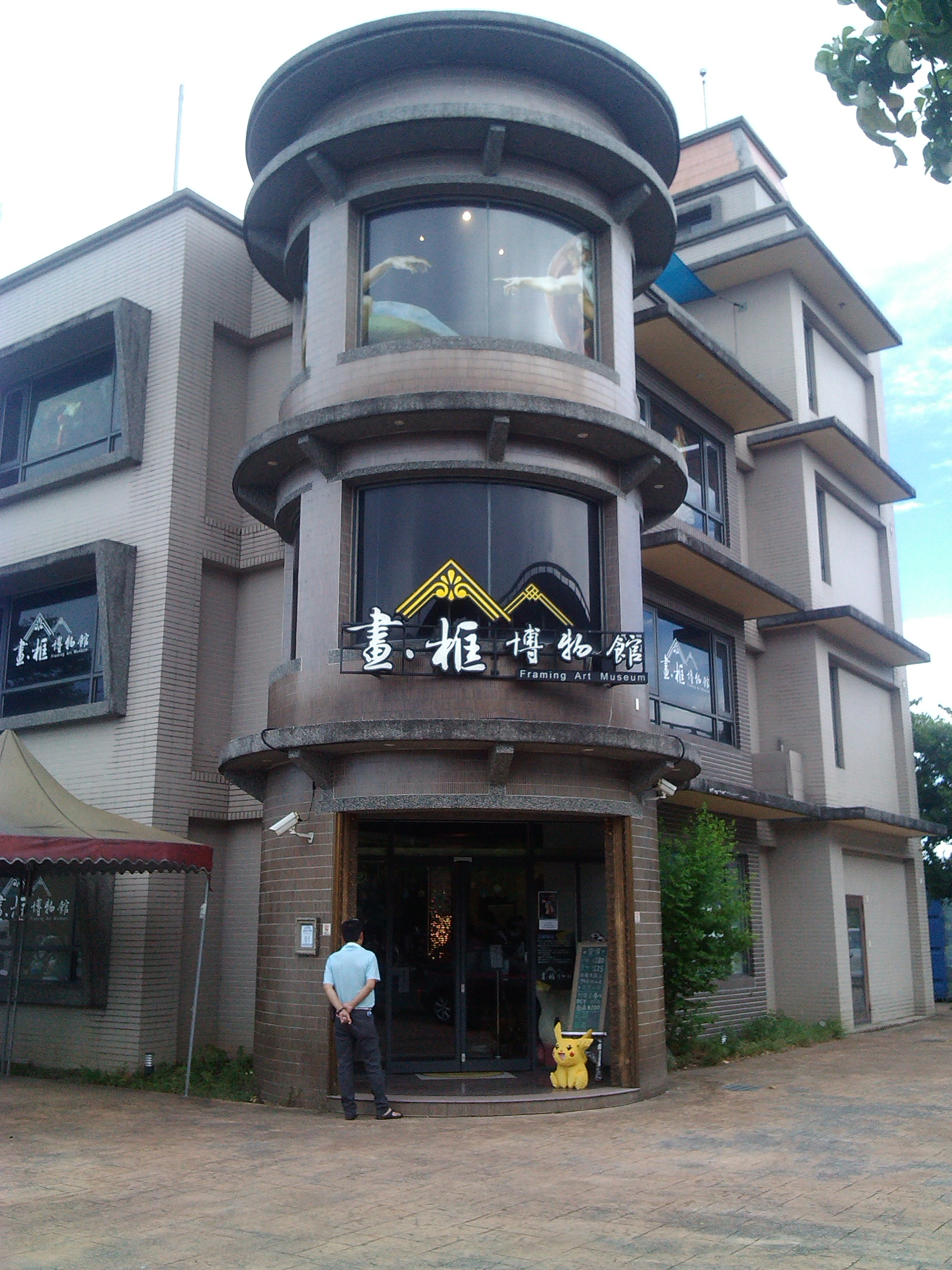 位於國道五號與196縣道(五結路三段)交界口東南側 近五結市區